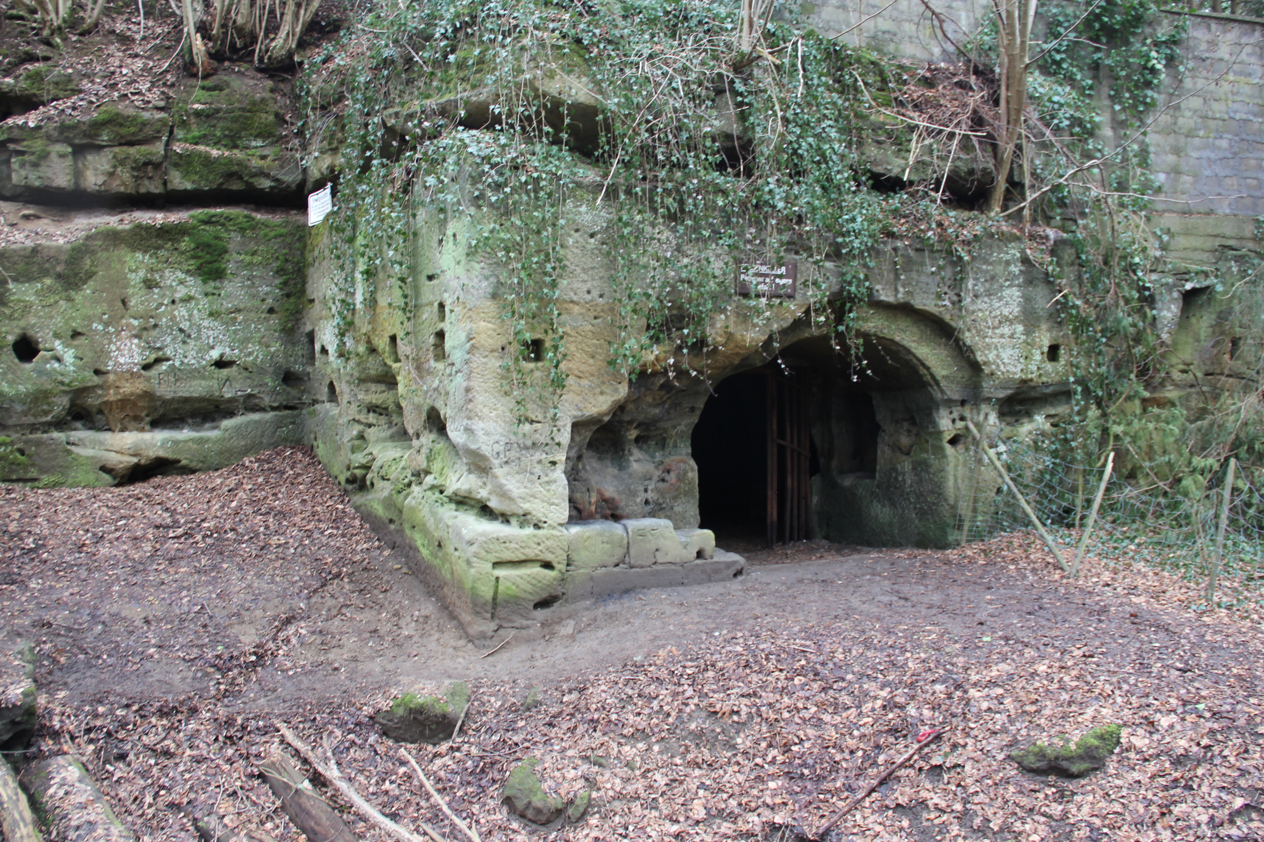 Löwengrube bei Altdorf, Blick auf Felsenkeller